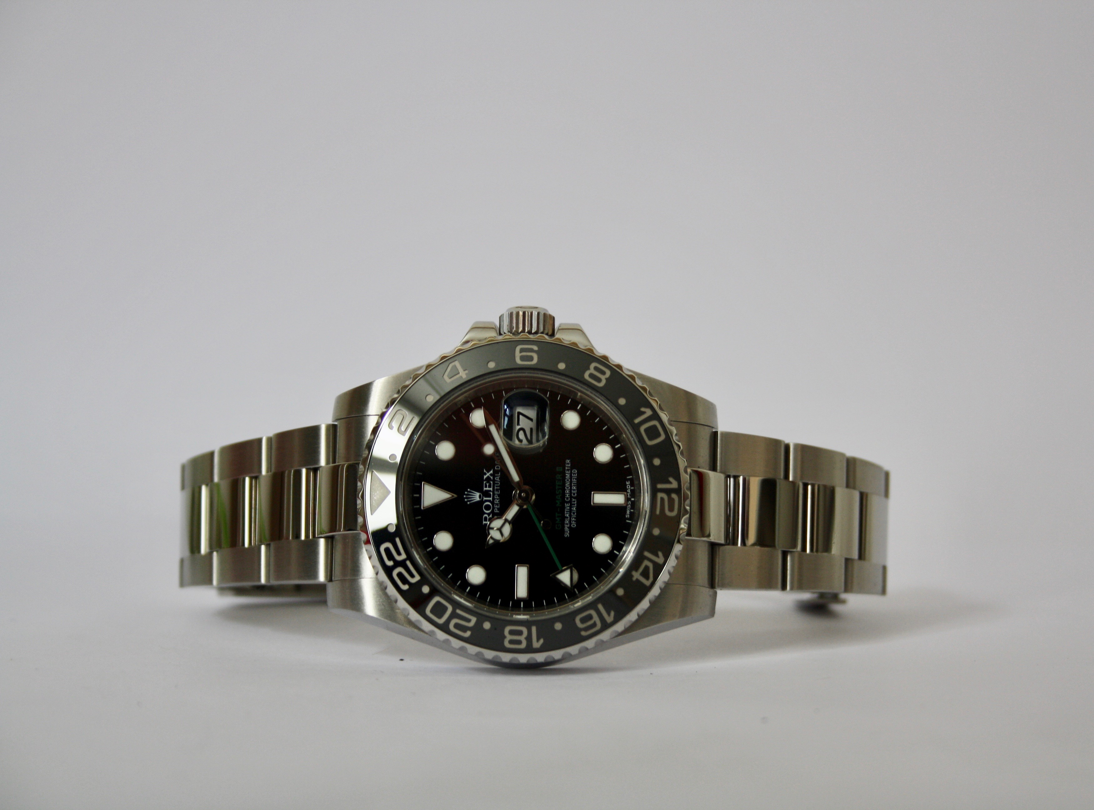 Rolex GMT Master II (116710 LN)